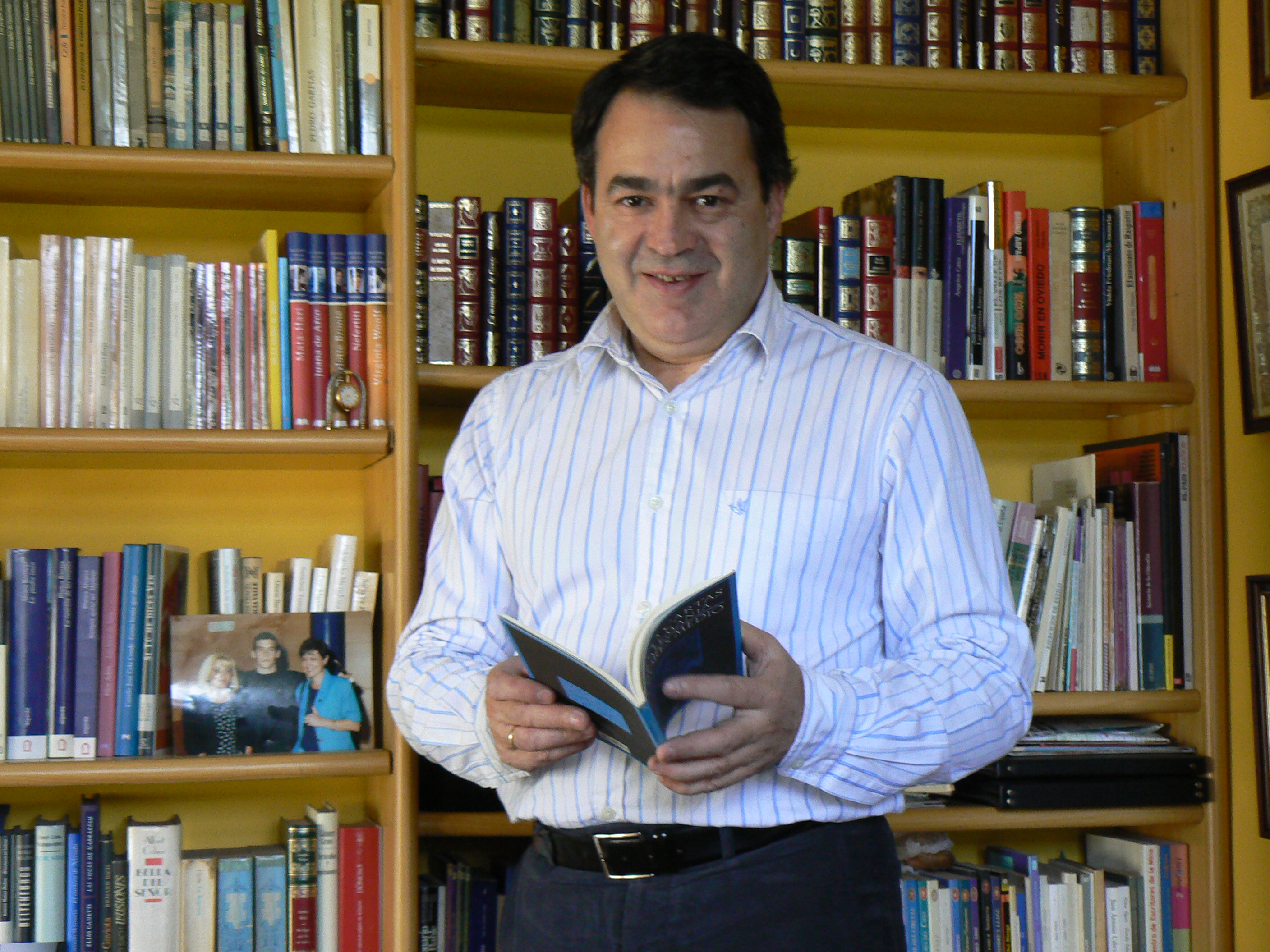 Fulgencio Argüelles